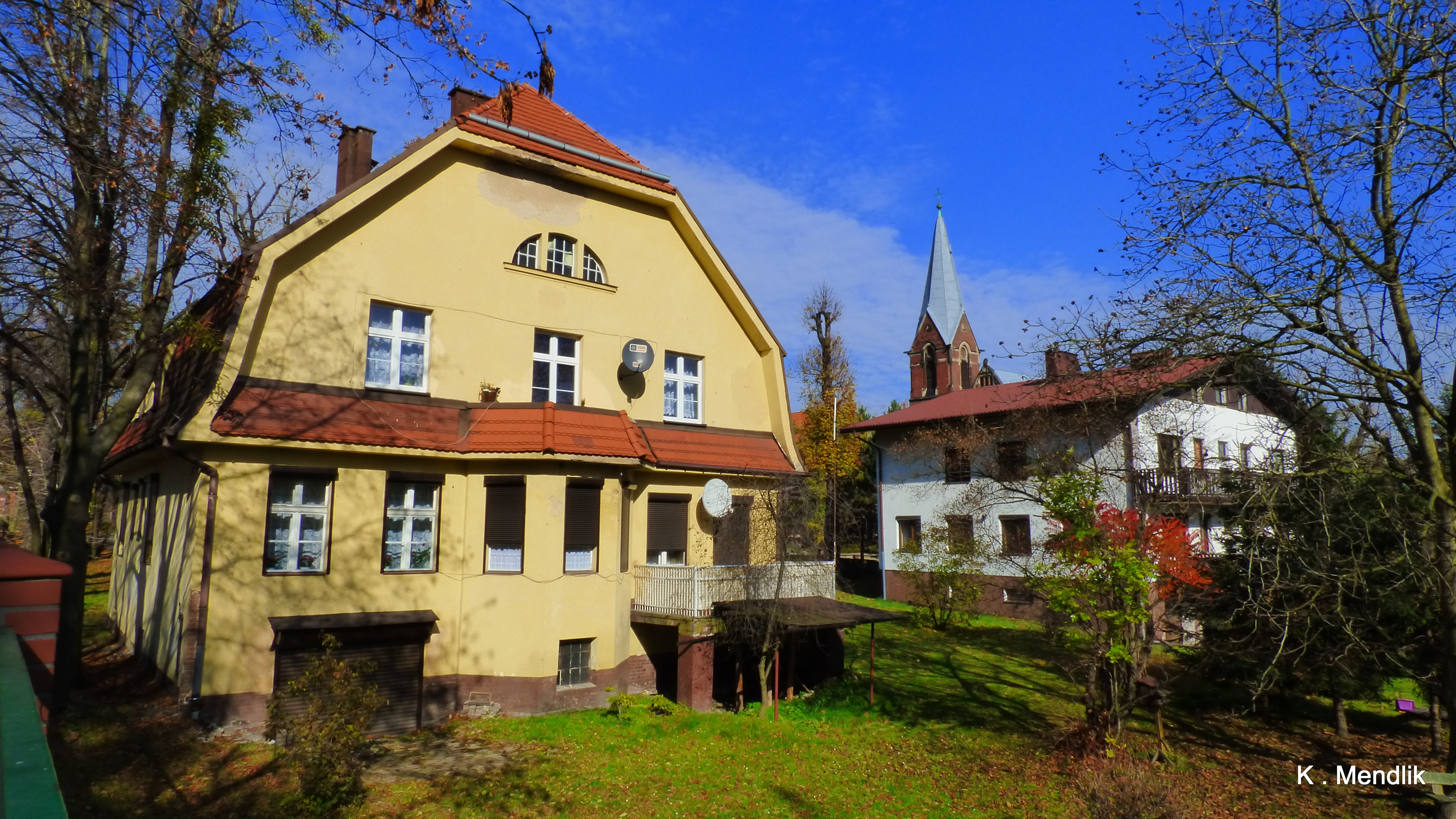 Bytom - Miechowice : Widok z ulicy Matki Ewy, plebania i teren domu opieki, dawny Dom "Elim".